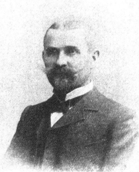 Österreichischer Politiker, Reichsratswahl 1907, Name siehe Dateiname